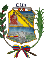 My version of the Coat of Arms of Cuá. Escudo del municipio Urdaneta, estado Miranda, Venezuela